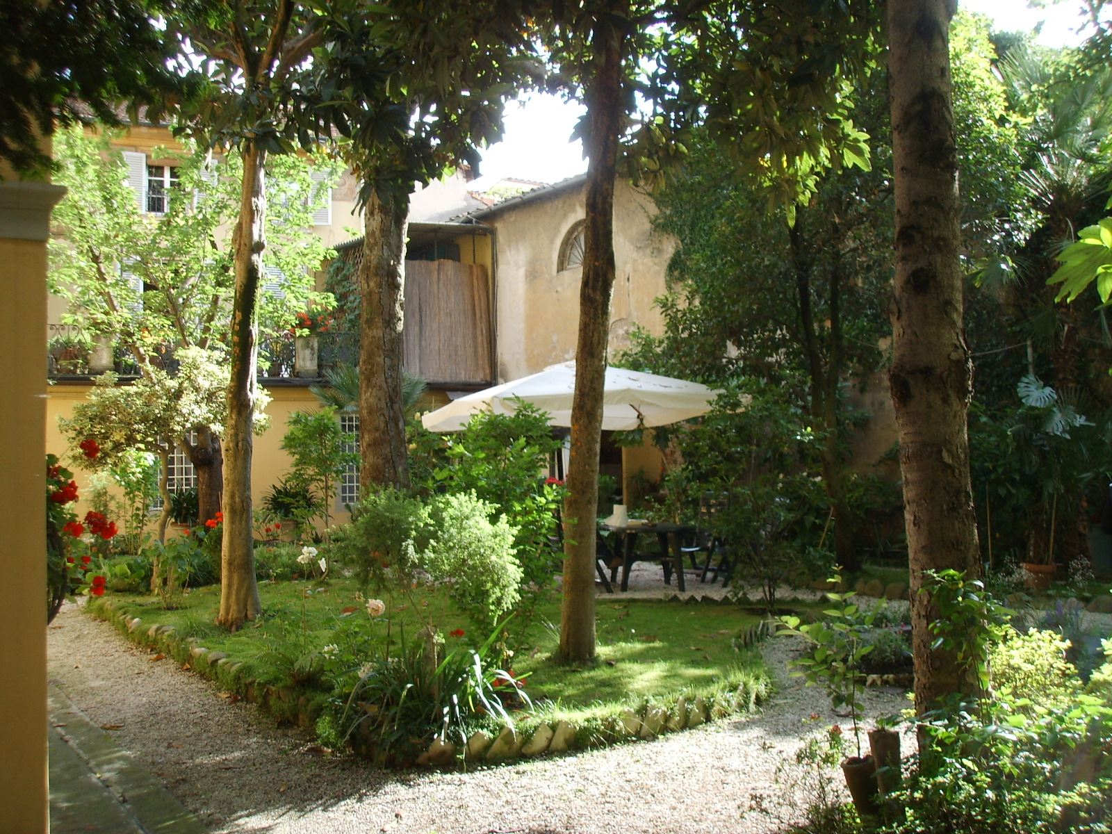 Palazzo brancoli pantera, giardino 01